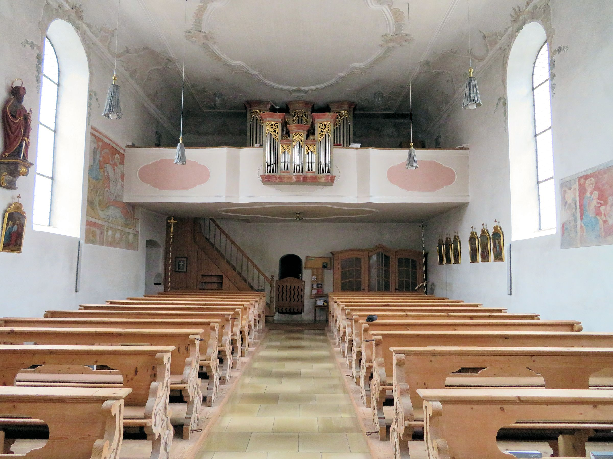 St. Peter und Paul in Hopfen am See ist eine barockisierte Kirche, deren Ursprünge wohl auf das 11. Jh. zurückgehen. Sie enthält gotische Fresken und Malereien von Claudius Schraudolph dem Älteren sowie Stuck von Joseph Fischer aus Faulenbach.